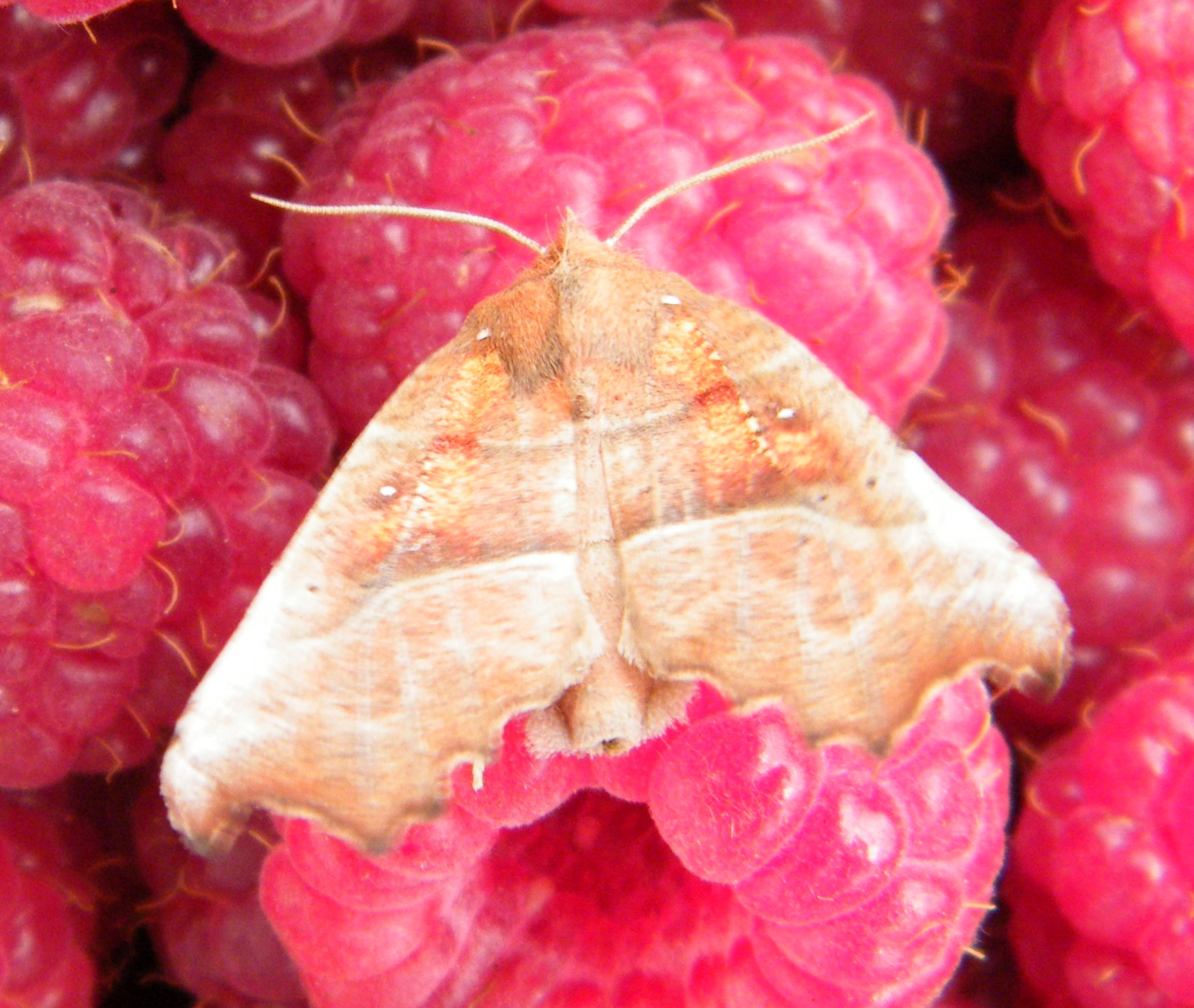 Scoliopteryx libatrix, forme pâle.